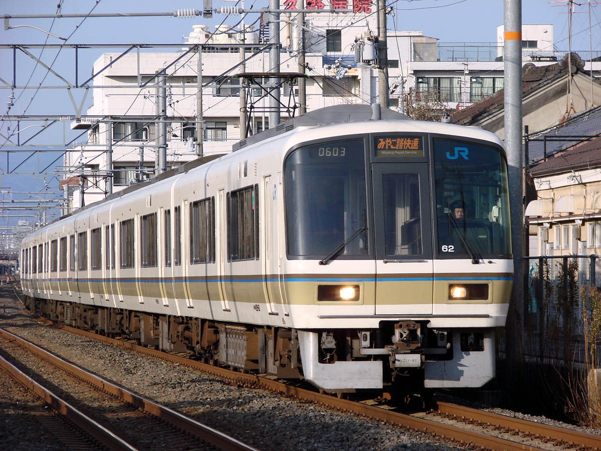 JR西日本221系「みやこ路快速」（奈良線東福寺駅－稲荷駅間）